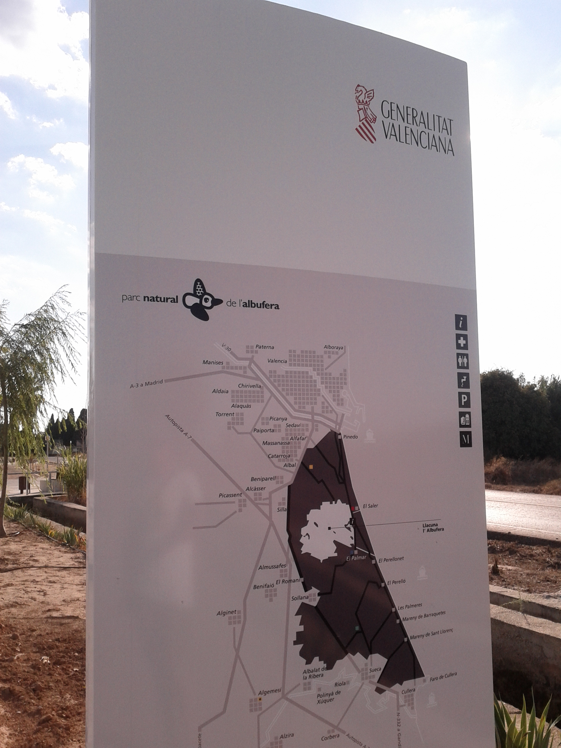 Cartell del Mapa del Parc Natural de l'Albufera a Algemesí (València, Espanya).